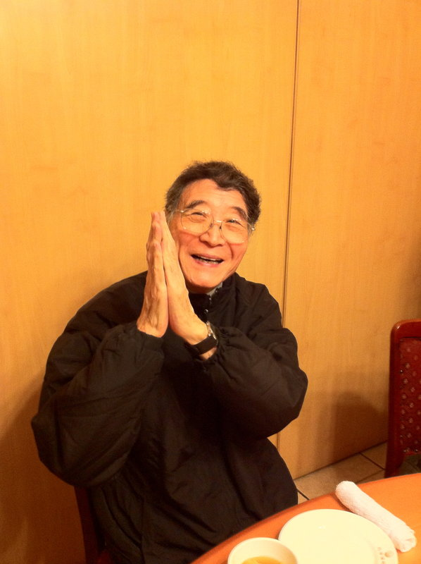 中華民國行政院文化建設委員會生活美學推動小組召集人漢寶德拜早年。